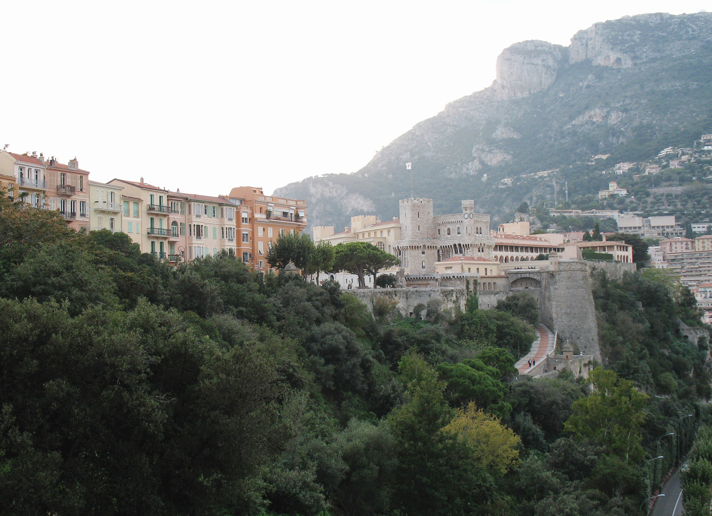 Monaco, palais, France